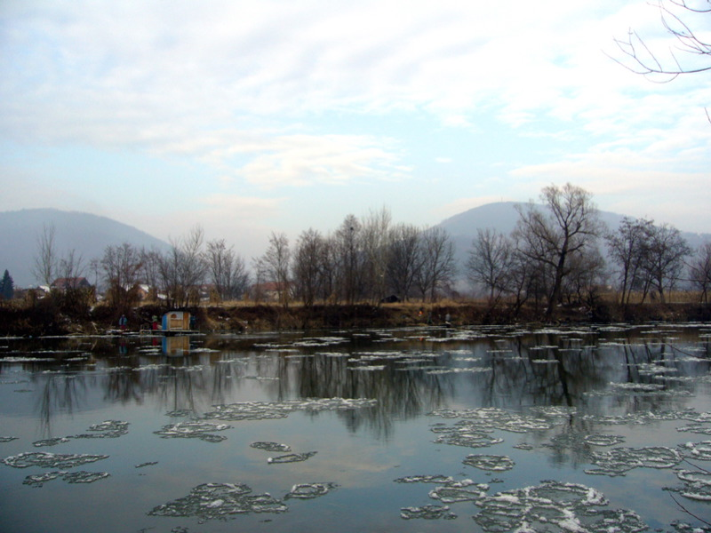 morava